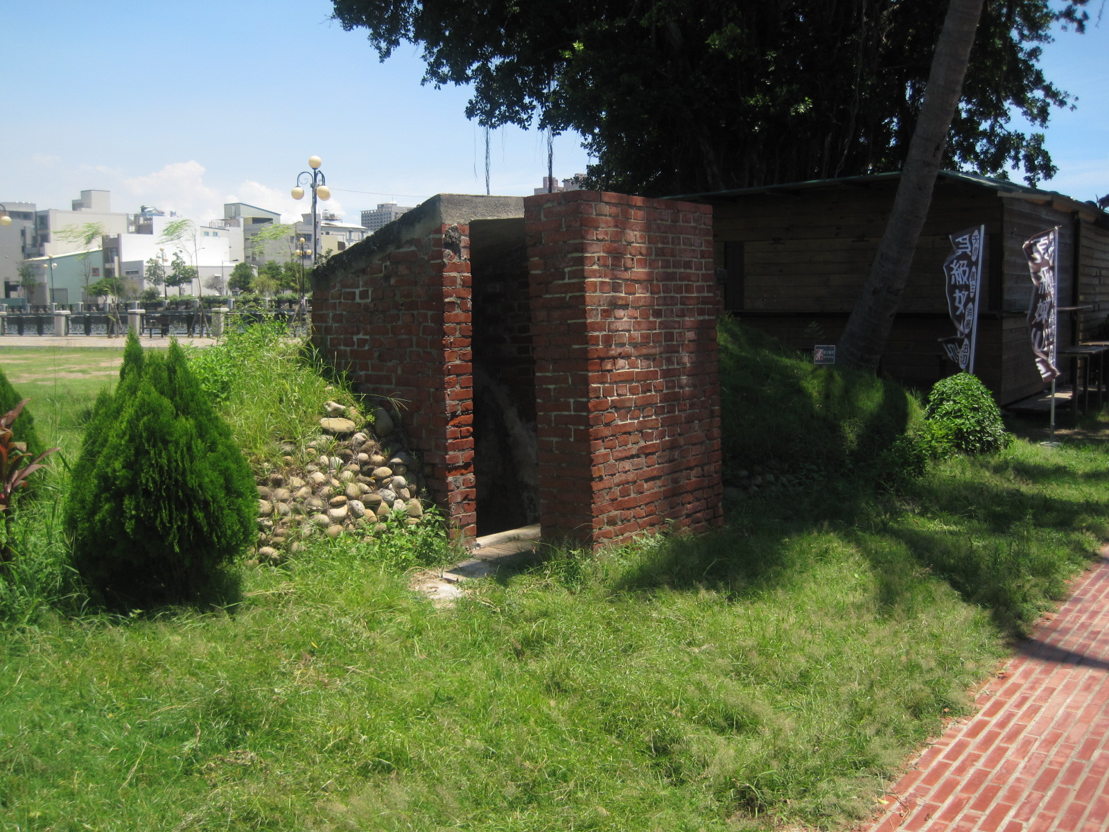 臺南運河博物館防空洞。